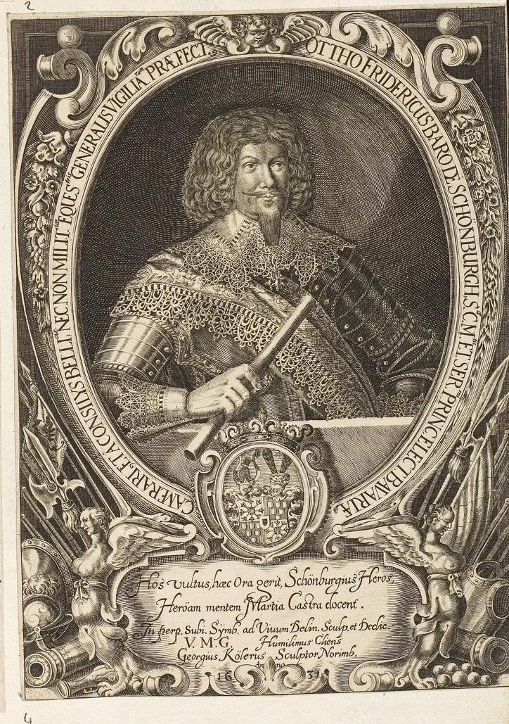 Grafik aus dem Klebeband Nr. 1 der Fürstlich Waldeckschen Hofbibliothek Arolsen Motiv: Otto Friedrich von Schönburg auf Wesel (1589–1631), deutscher Adliger und Offizier